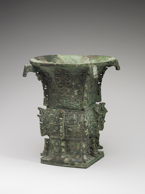 西周早期 夨令方尊 Square Zun wine vessel of Ze-lin, early Western Zhou Dynasty, c. 11th to 10th century B.C.E. 國立故宮博物院館藏 夨令方尊證實西周諸侯制度為「侯、甸、男」